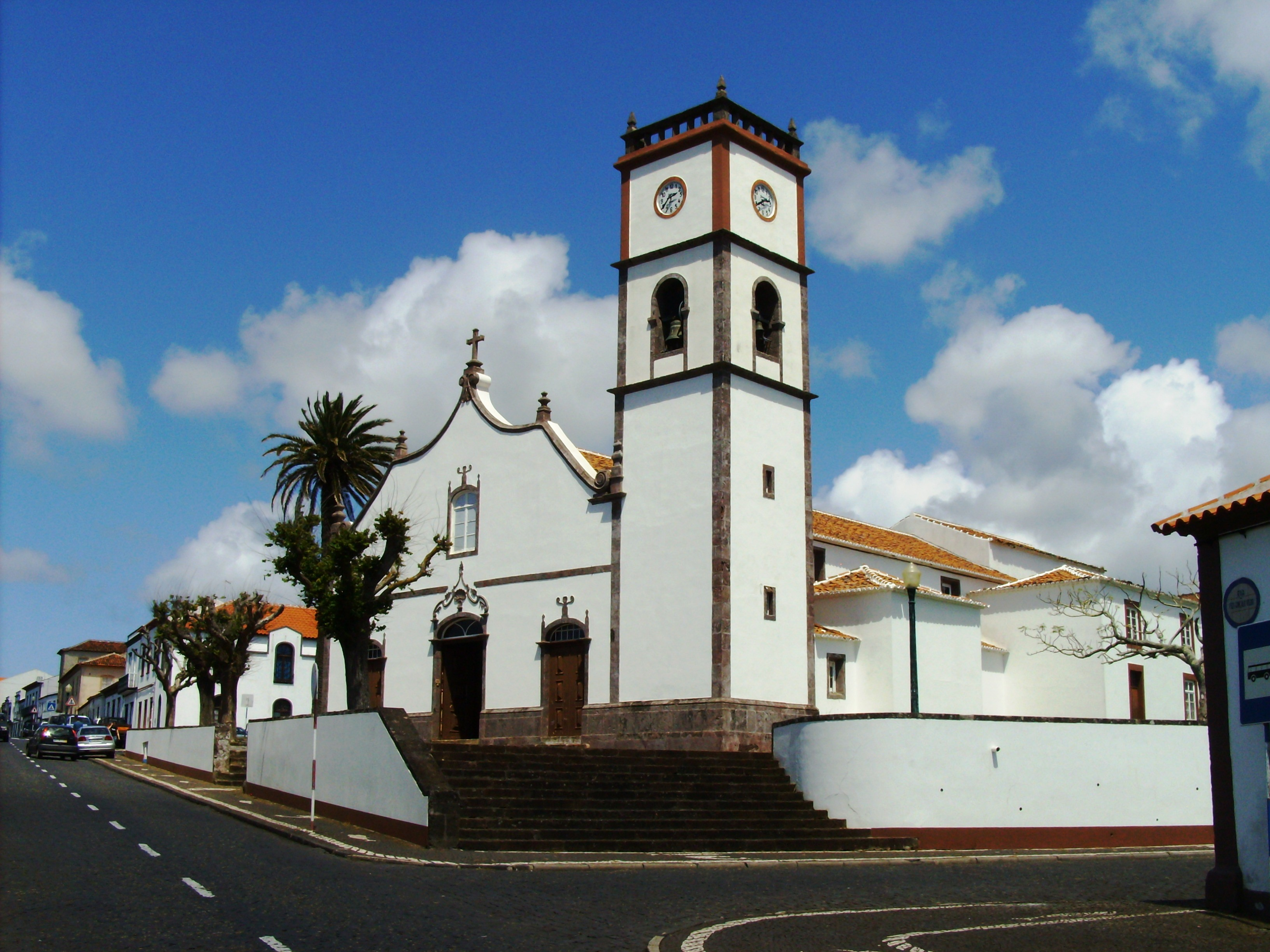 Igreja Matriz de Nossa Senhora da Assunção, freguesia e concelho de Vila do Porto, ilha de Santa Maria, Açores.